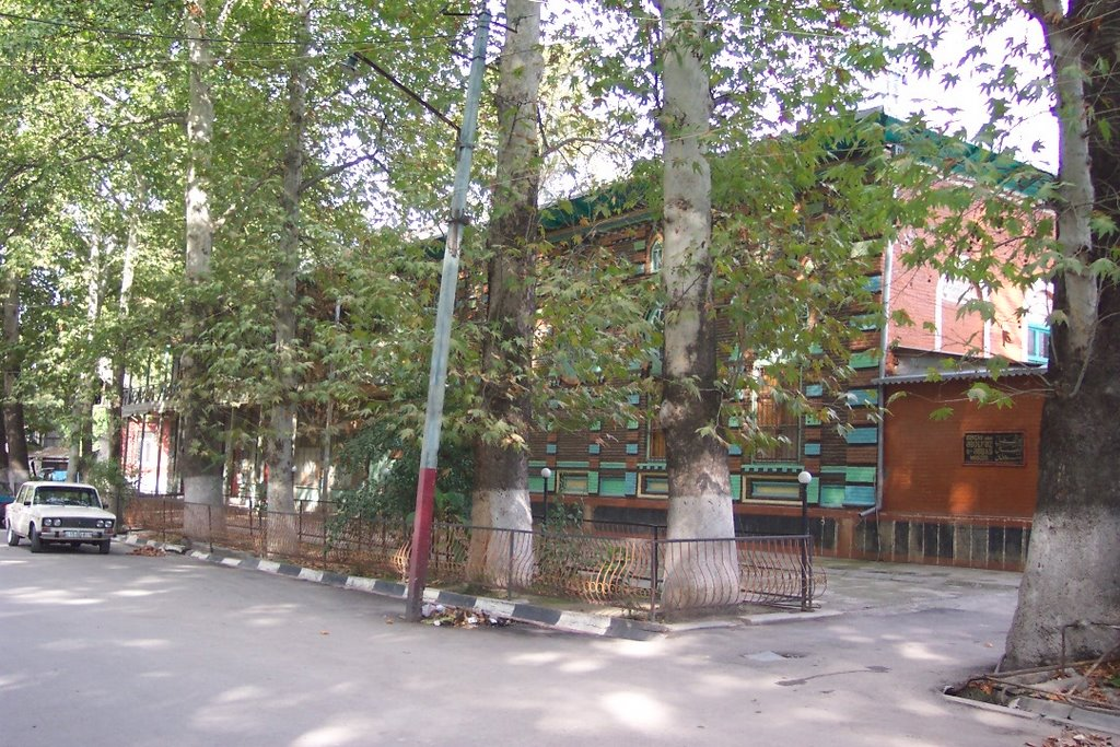 Mosque of Goychay, Azerbaijan. Built in 1903.